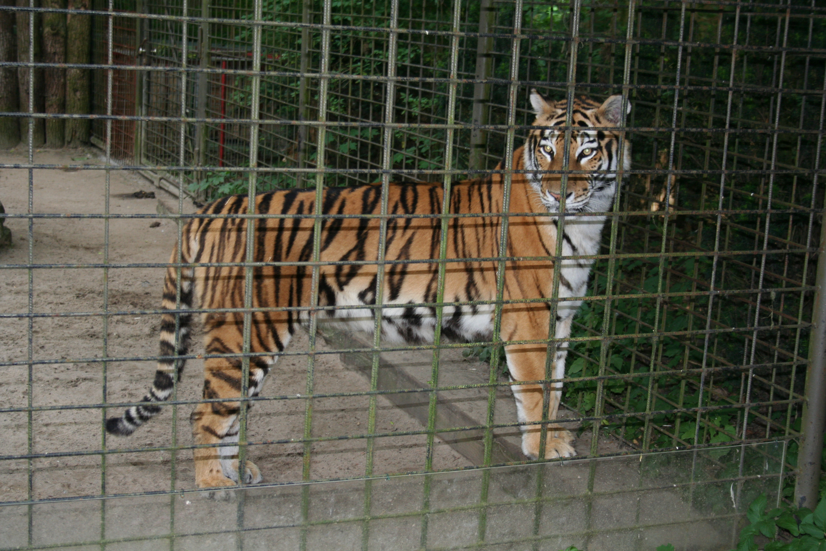 Tierpark Hamm, Sibirischer Tiger